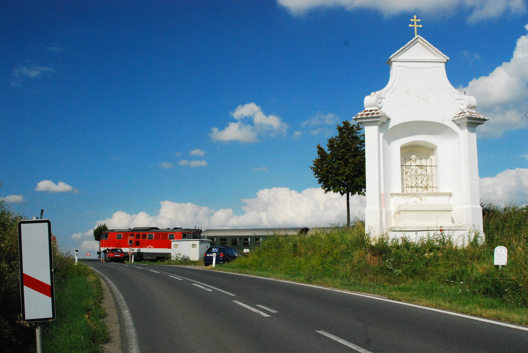 Die Schußbergmarter zwischen Retz und Oberretzbach mit dem Reblaus-Express